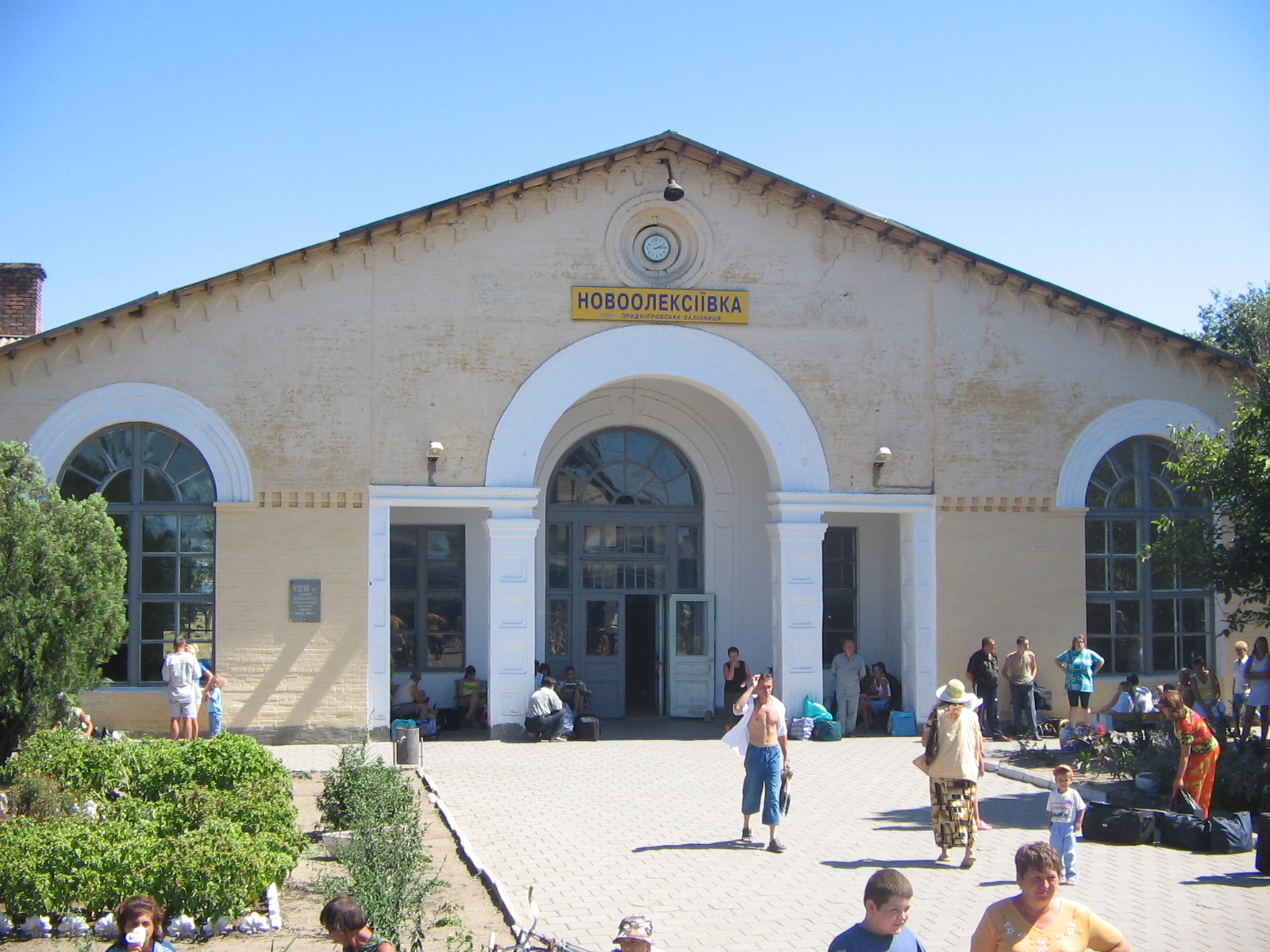 Вокзал города Новоалексеевка